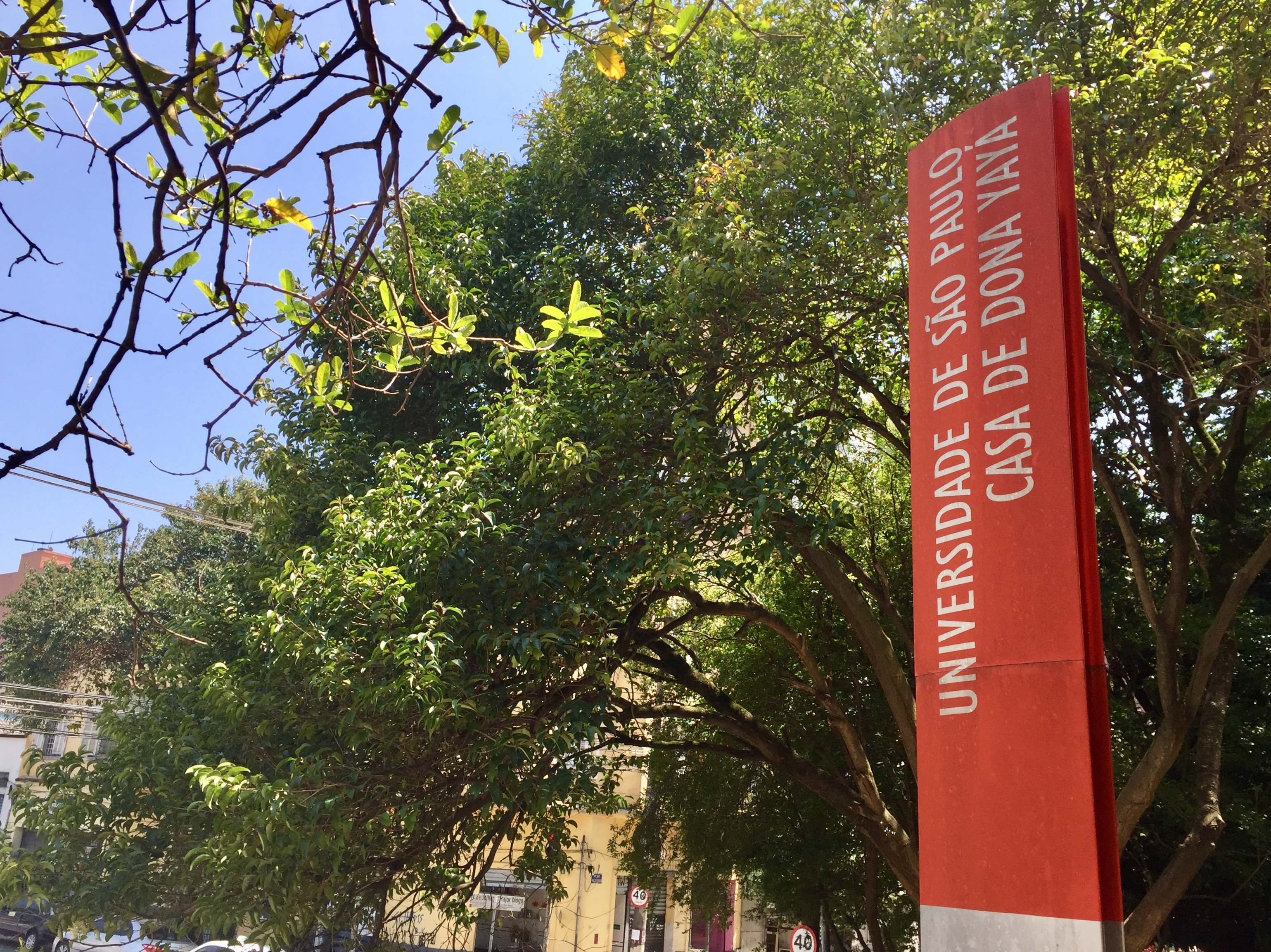 Placa com os dizeres "Universidade de São Paulo Casa de Dona Yayá" em frente à Casa de Dona Yayá, em São Paulo (SP), Brasil